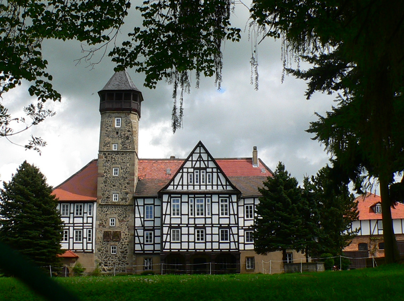 Schloss Falkenberg (02) in Wabern-Falkenberg, Hessen, Regierungsbezirk Kassel, Schwalm-Eder-Kreis